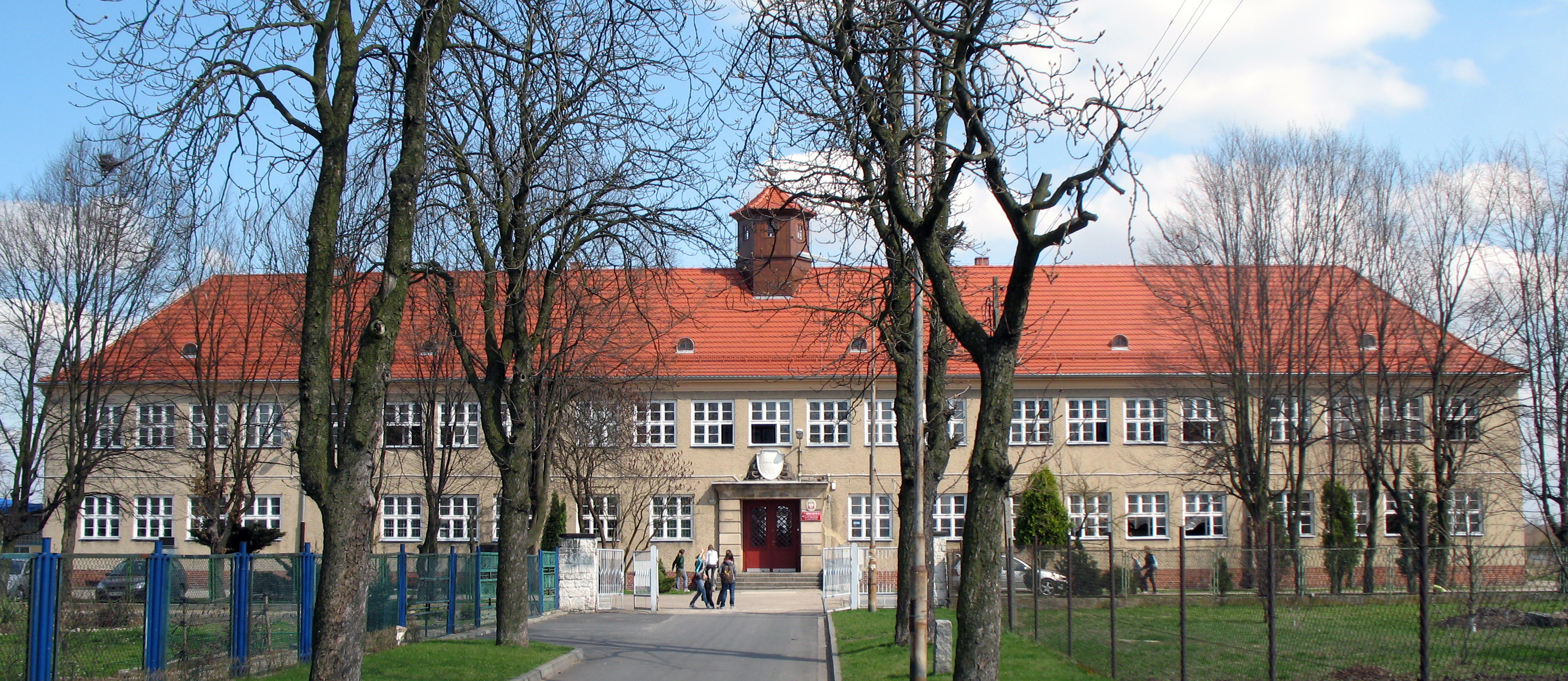 Wrocław, gimnazjum nr 22, ul. Lubelska 95a